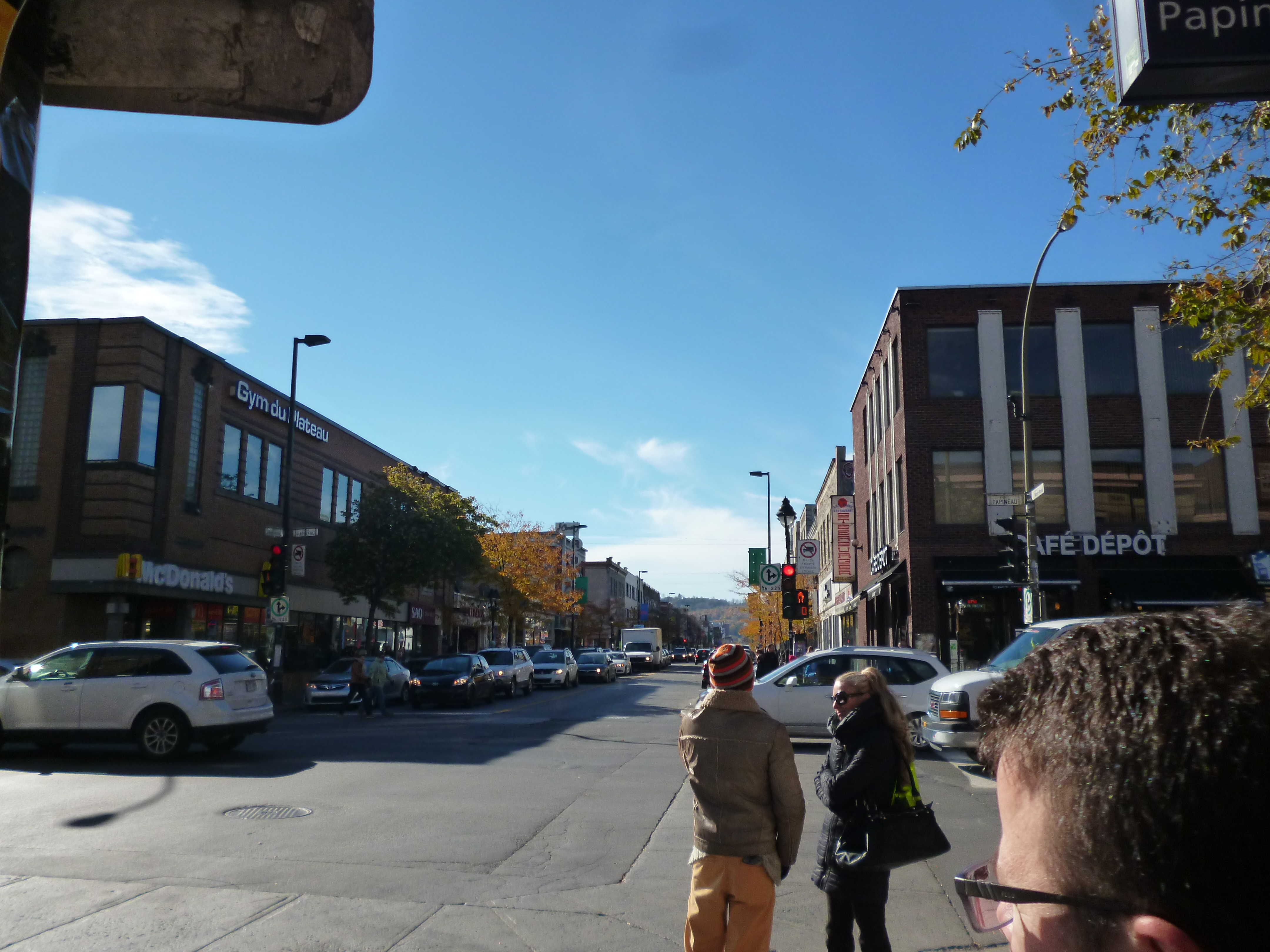 L'avenue du Mont-Royal, à Montréal (Canada), au niveau de l'intersection avec l'avenue Papineau.